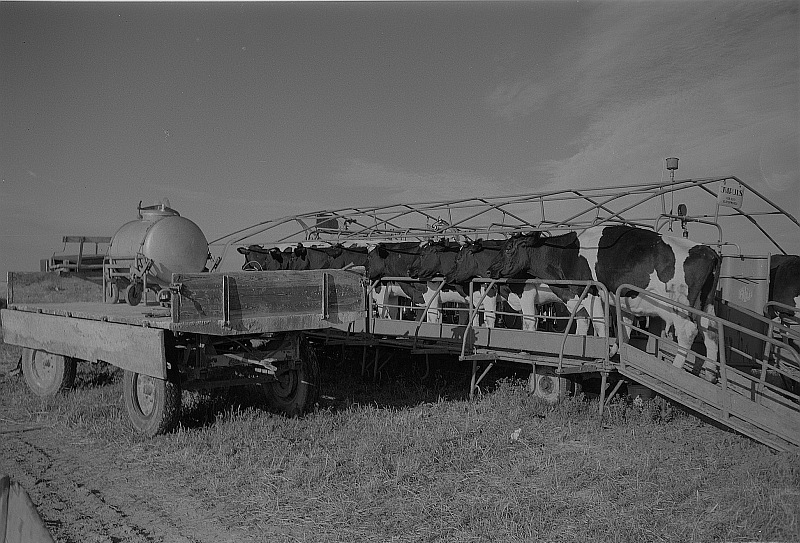 Original image description from the Deutsche Fotothek Lancken. Melkstand